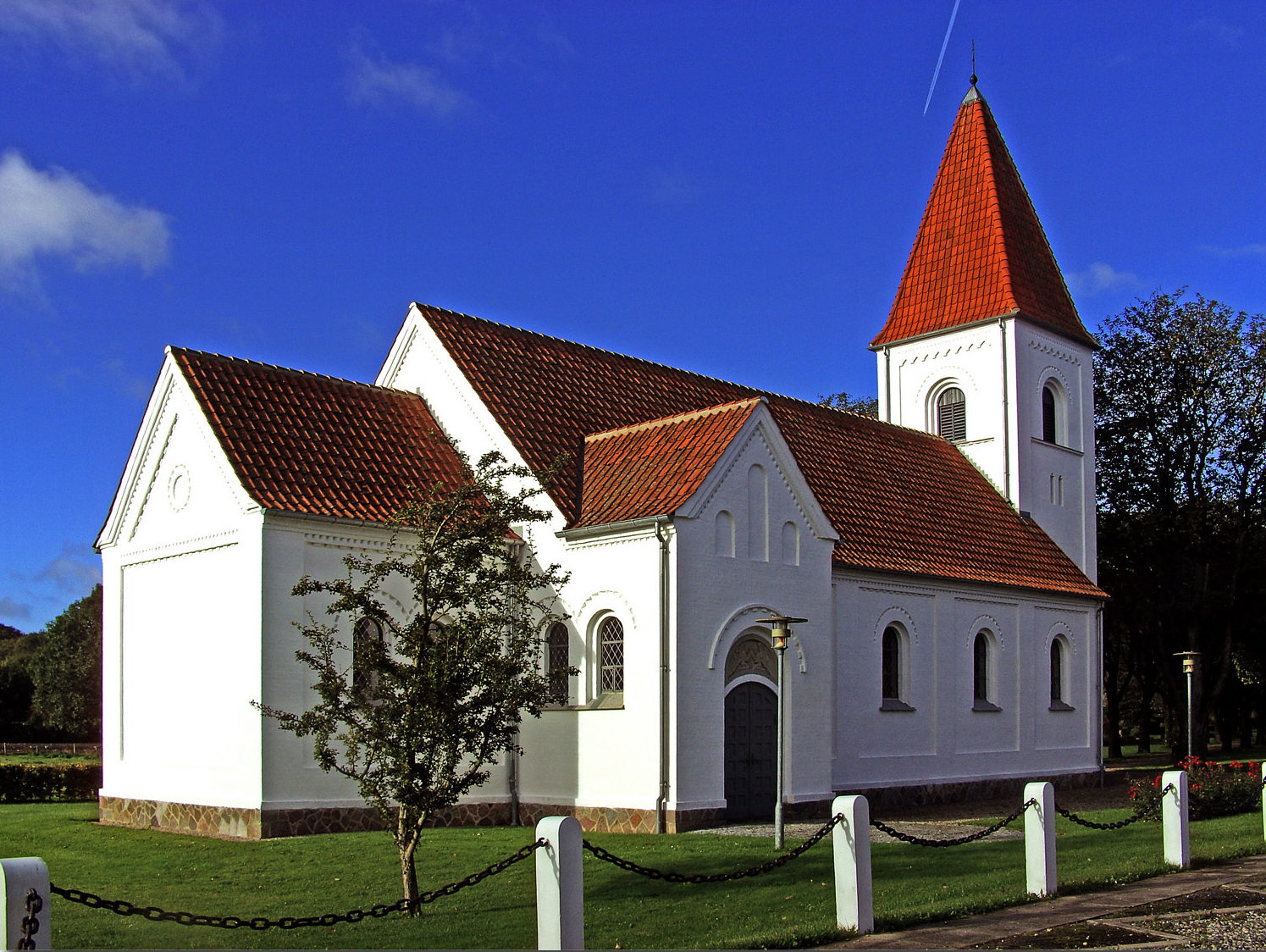 fra nordøst